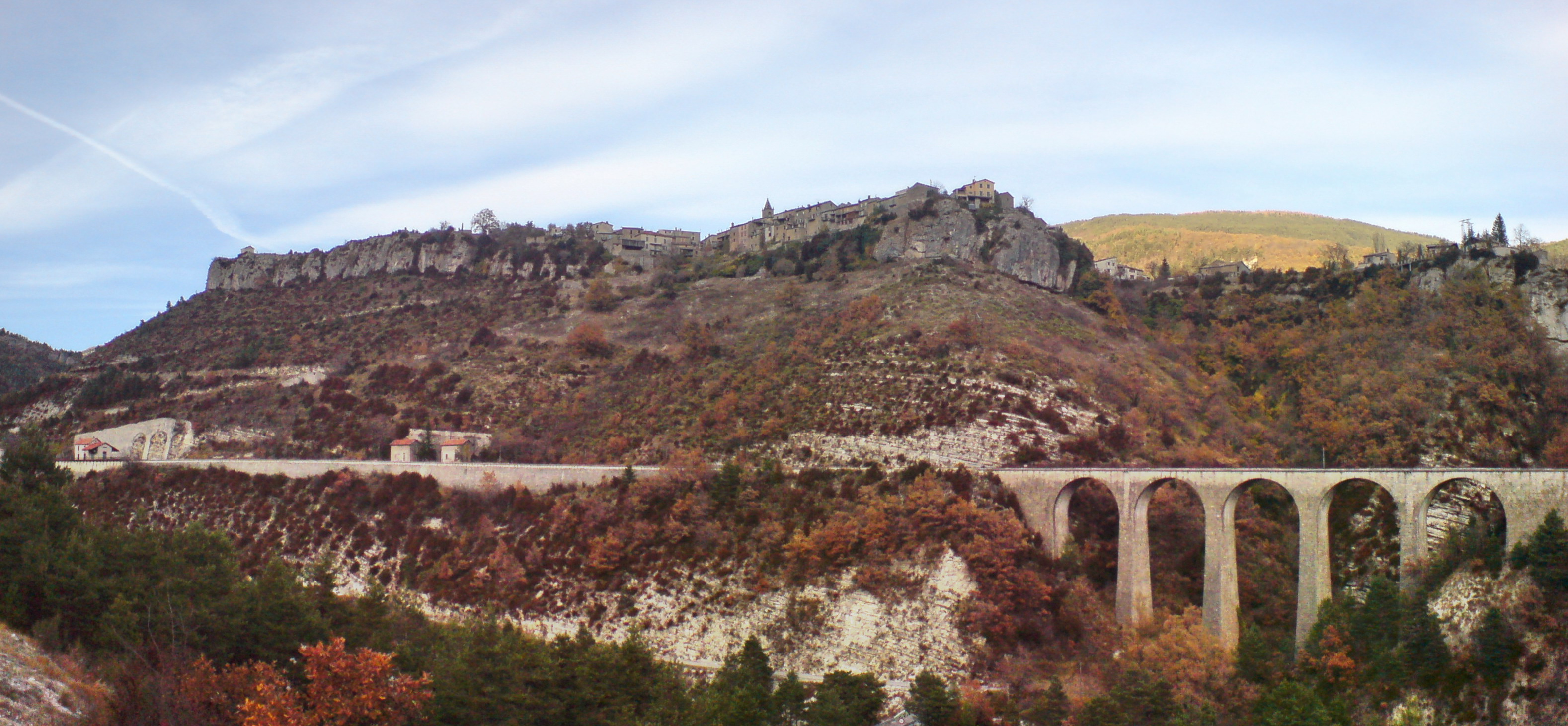 Le village perché de Méailles, dans les Alpes-de-Haute-Provence, et le viaduc des Chemins de fer de Provence (celui au sud de la gare).